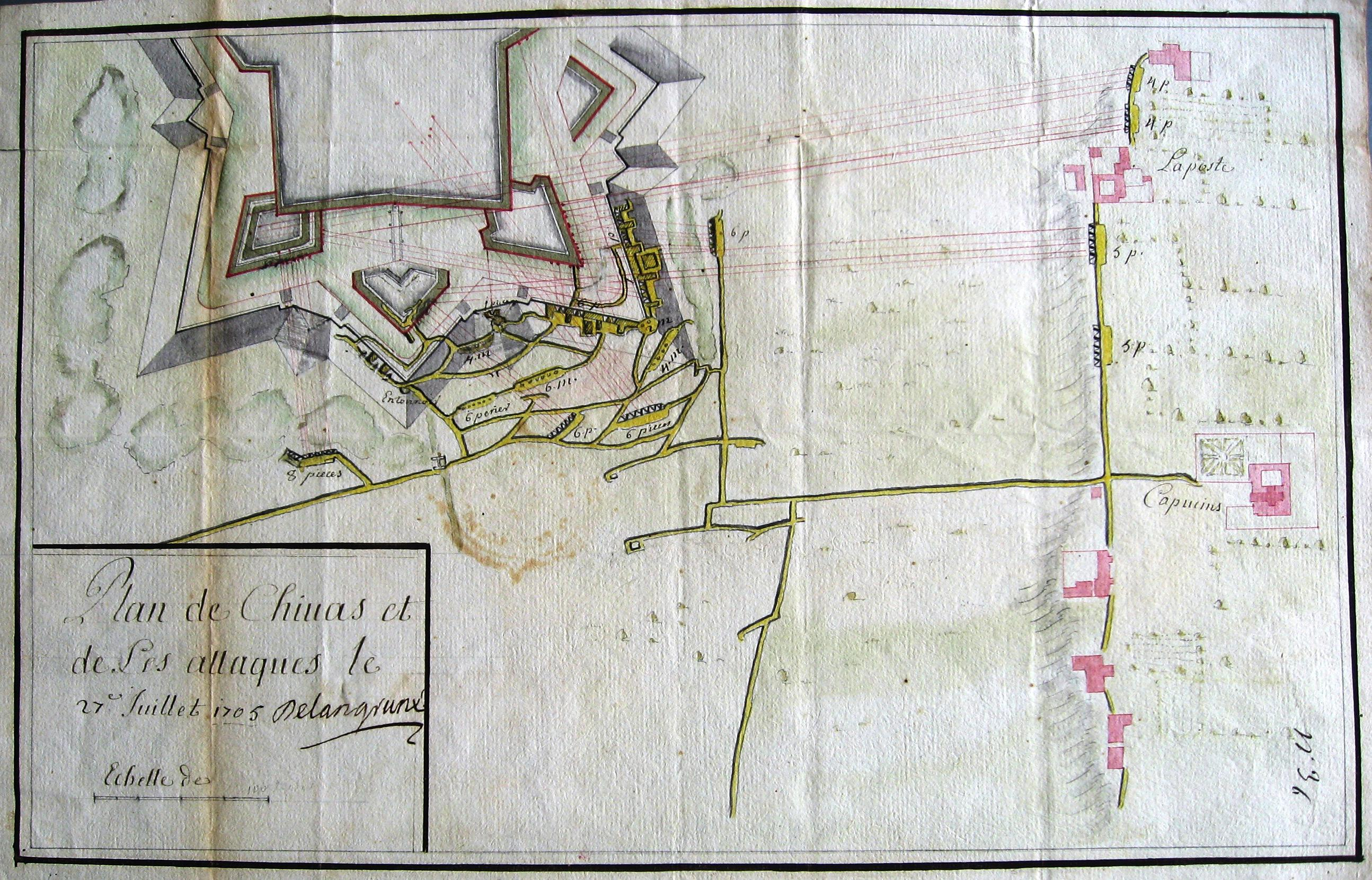 Plan de Chivas et des les attaques le 27 juillet 1705